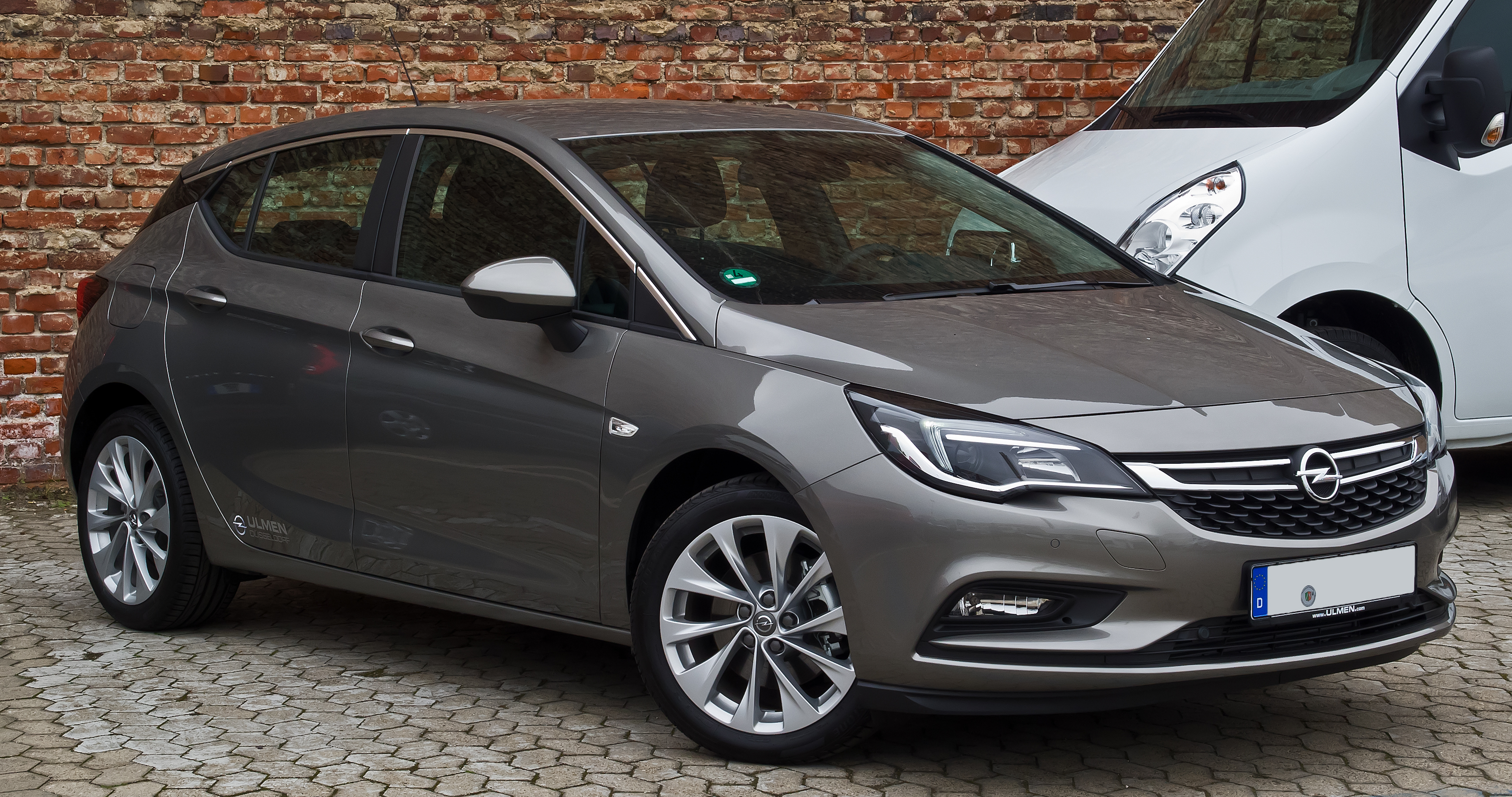 Opel Astra 1.6 CDTI ecoFLEX Edition (K)